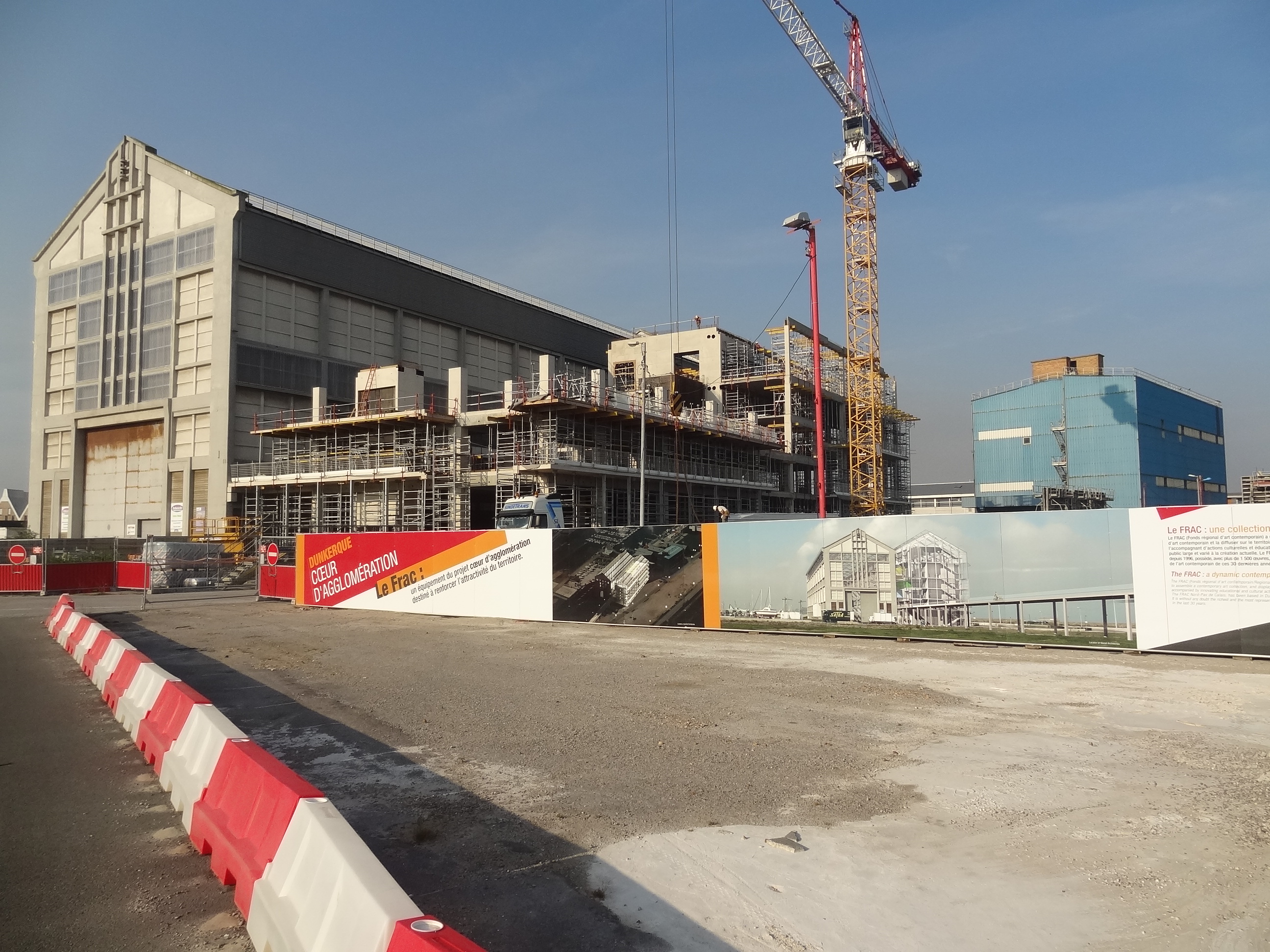 Dunkerque, chantier FRAC Nord Pas de Calais. Lacaton-Vassal